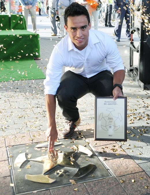 Жадсон - бразильський футболіст, півзахисник «Сан-Паулу» поряд зі своєю зіркою на Алеї слави ФК Шахтар (Донецьк)